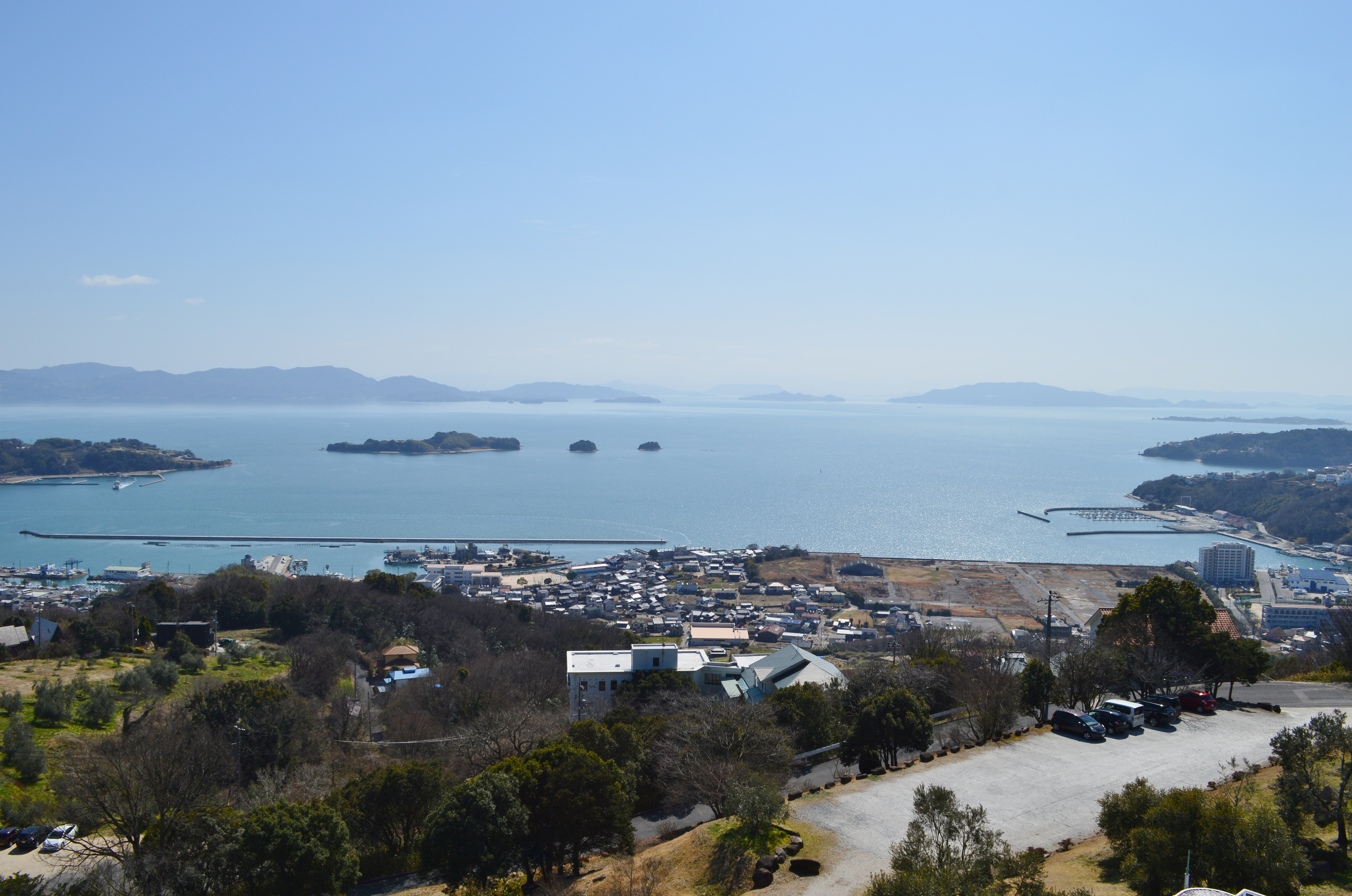 牛窓湾 (牛窓オリーブ園から望む)